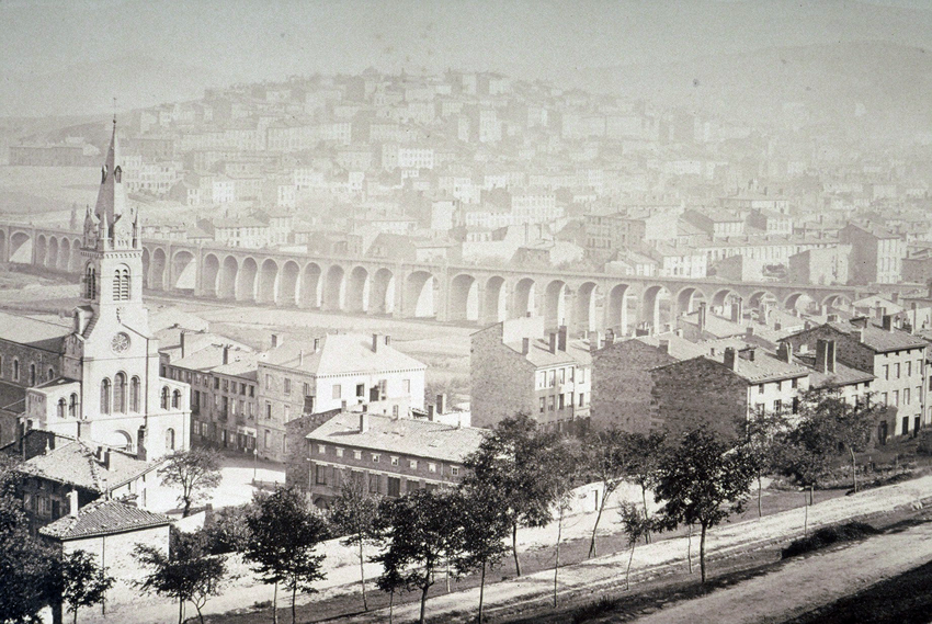 photographie du quartier de Montaud, Fr, 42